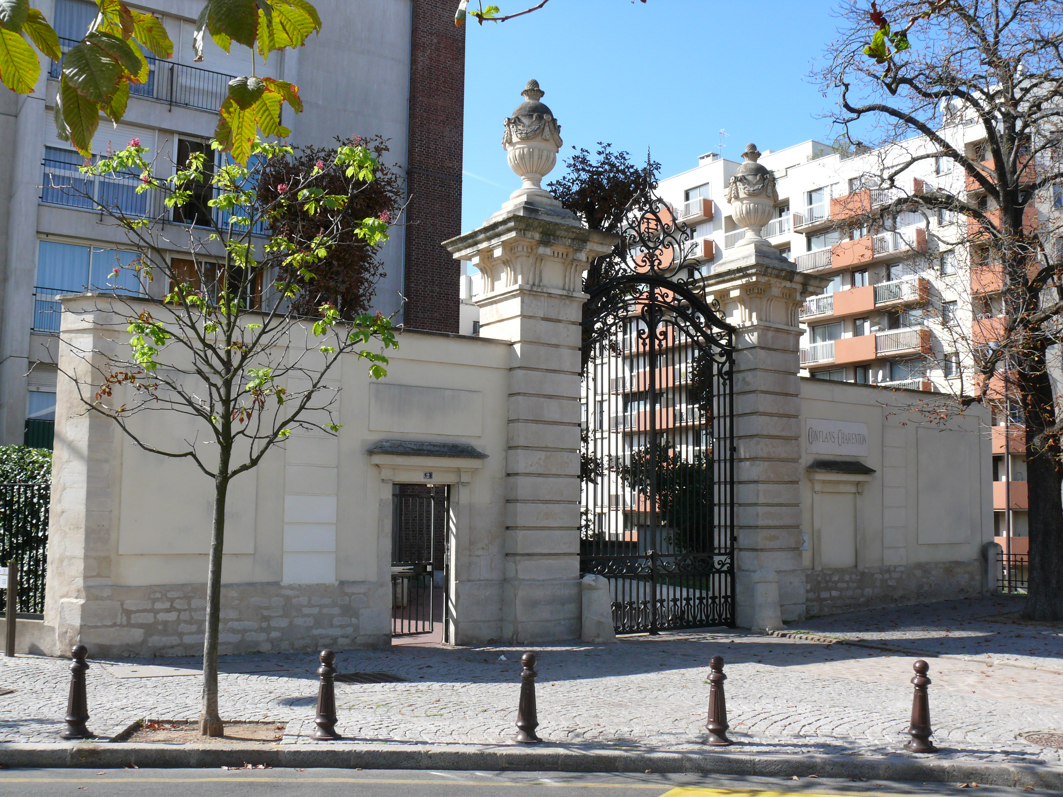 Portail d'entrée du Château de Conflans. Charenton le Pont - Val de Marne - France. Vestige de l'ancien archevêché. .